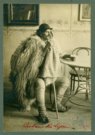 Adler - Cioban din Lupeni